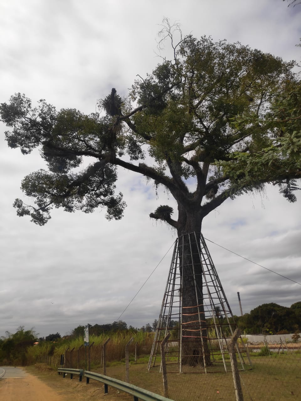 Árvore centenária com escoras para recuperação. Localização: bairro do Galo Branco, distrito de Eugênio de Melo, São José dos Campos, SP